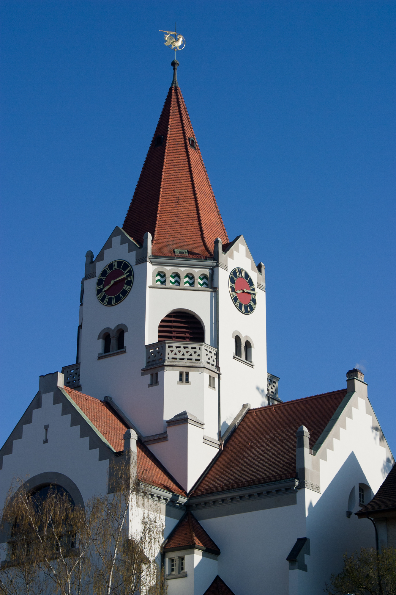 Reformierte Kirche in Weinfelden